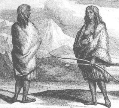 Mujeres californias, probablemente pericúes.